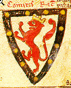 Znak Richarda z Cornwallu